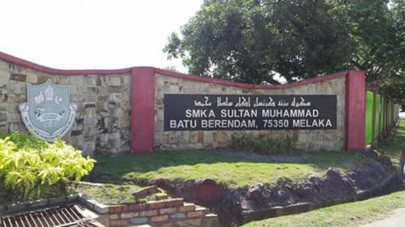 batu berendam